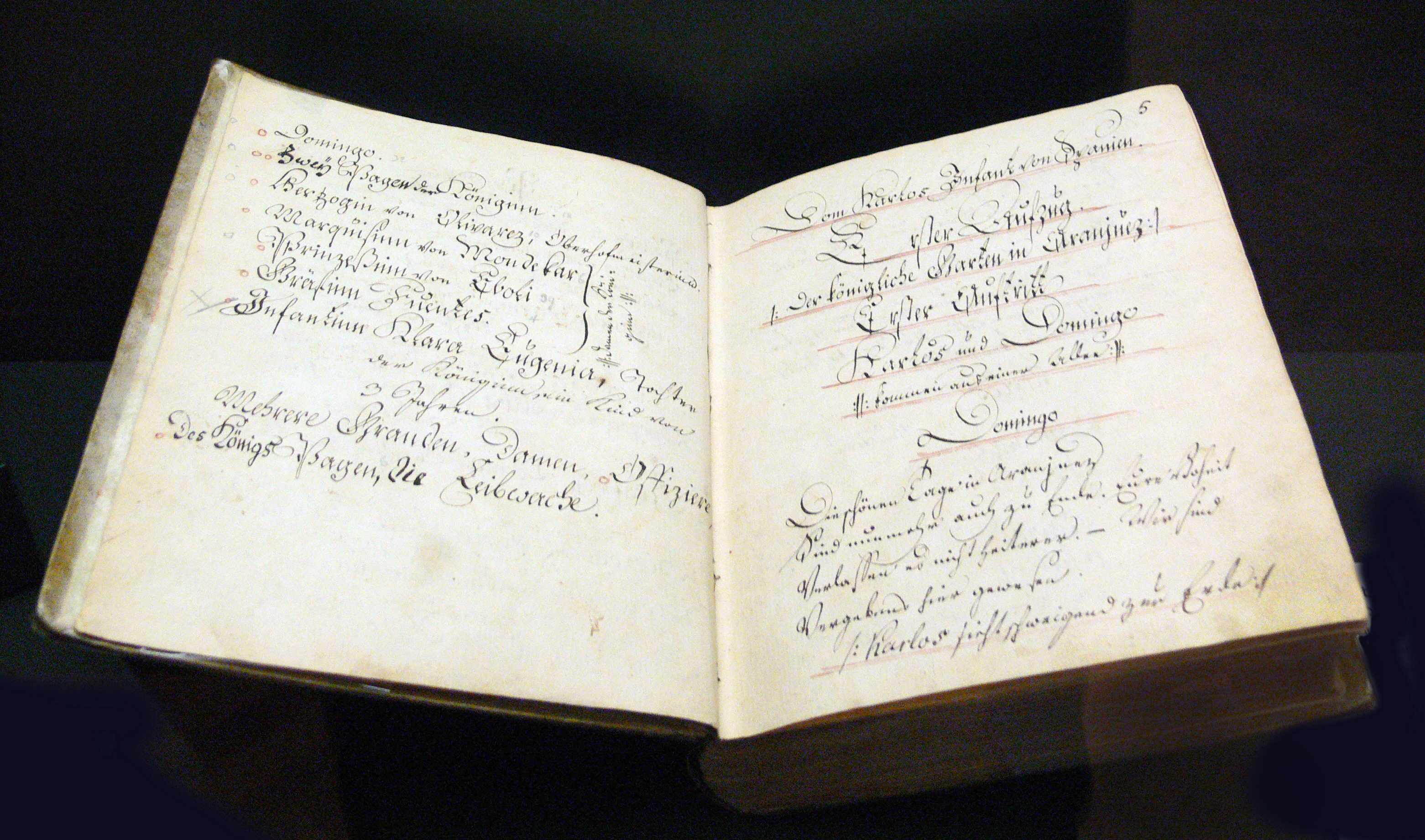 Soufflierbuch zur Aufführung von Schillers Don Karlos, Mannheim 1787 Collection: Reiss-Engelhorn-Museen, Mannheim